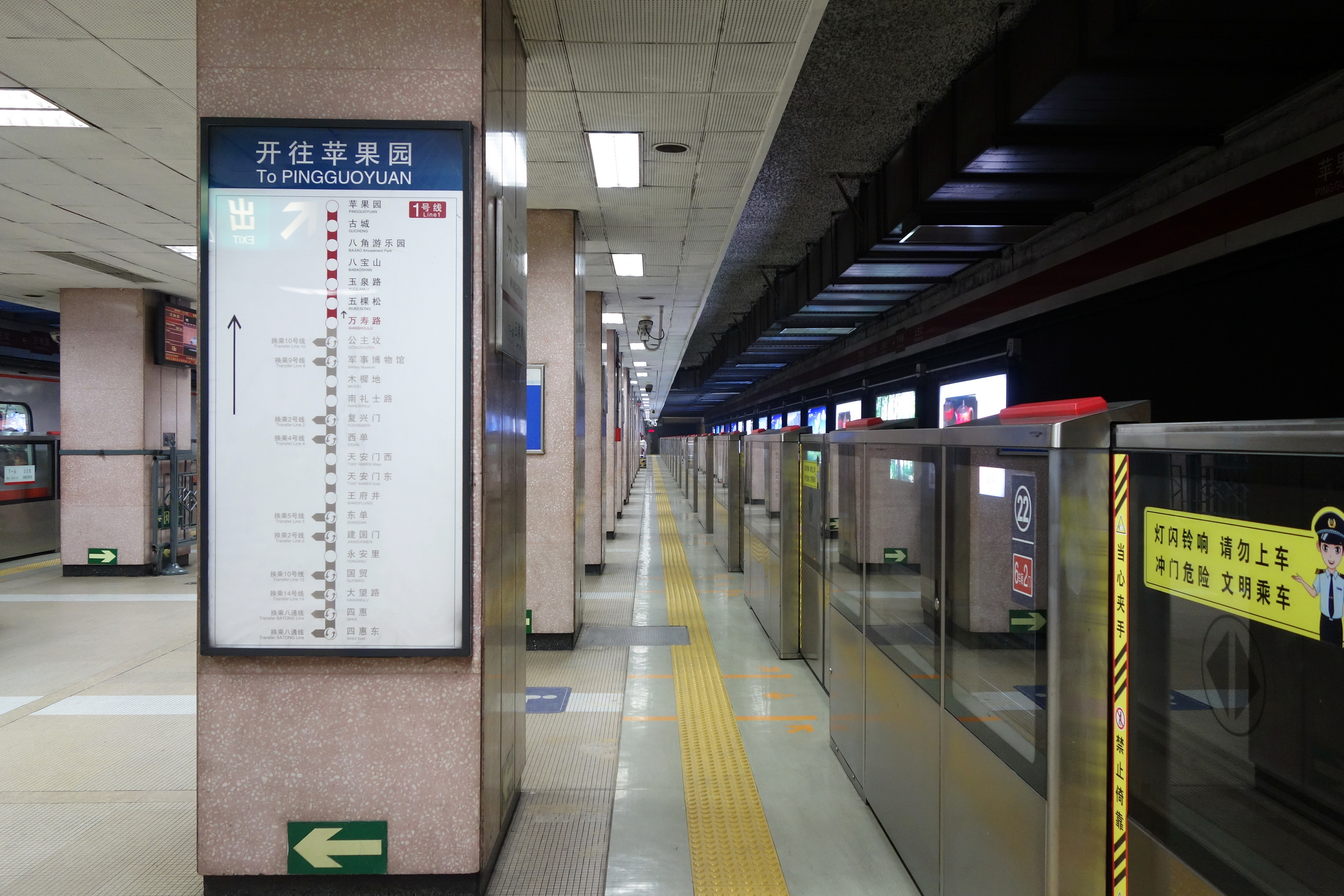 北京地铁1号线万寿路站站台。站台加装半高式安全门，2017年投入使用。